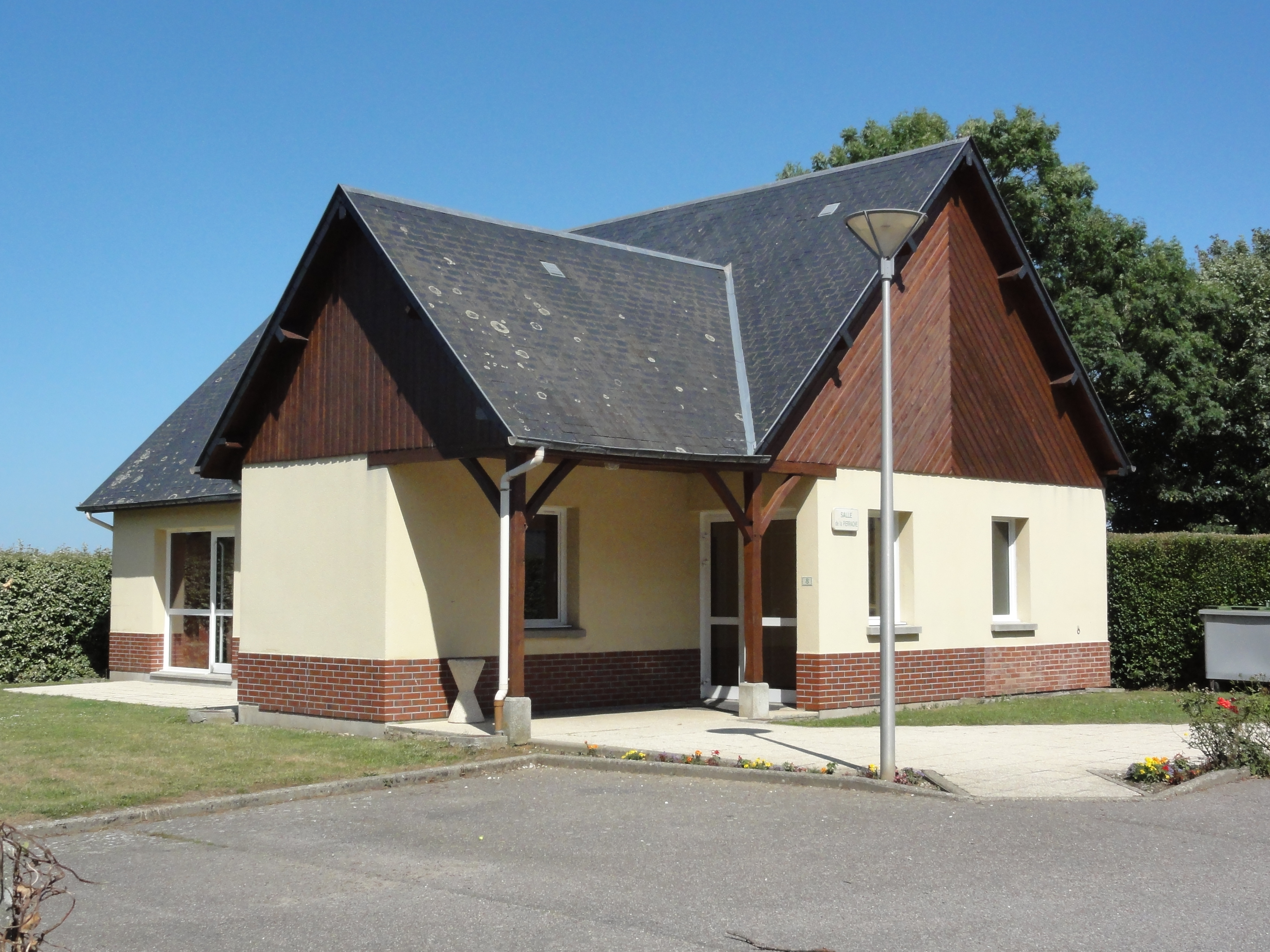 Écretteville-sur-Mer (Seine-Mar.) salle polyvalente